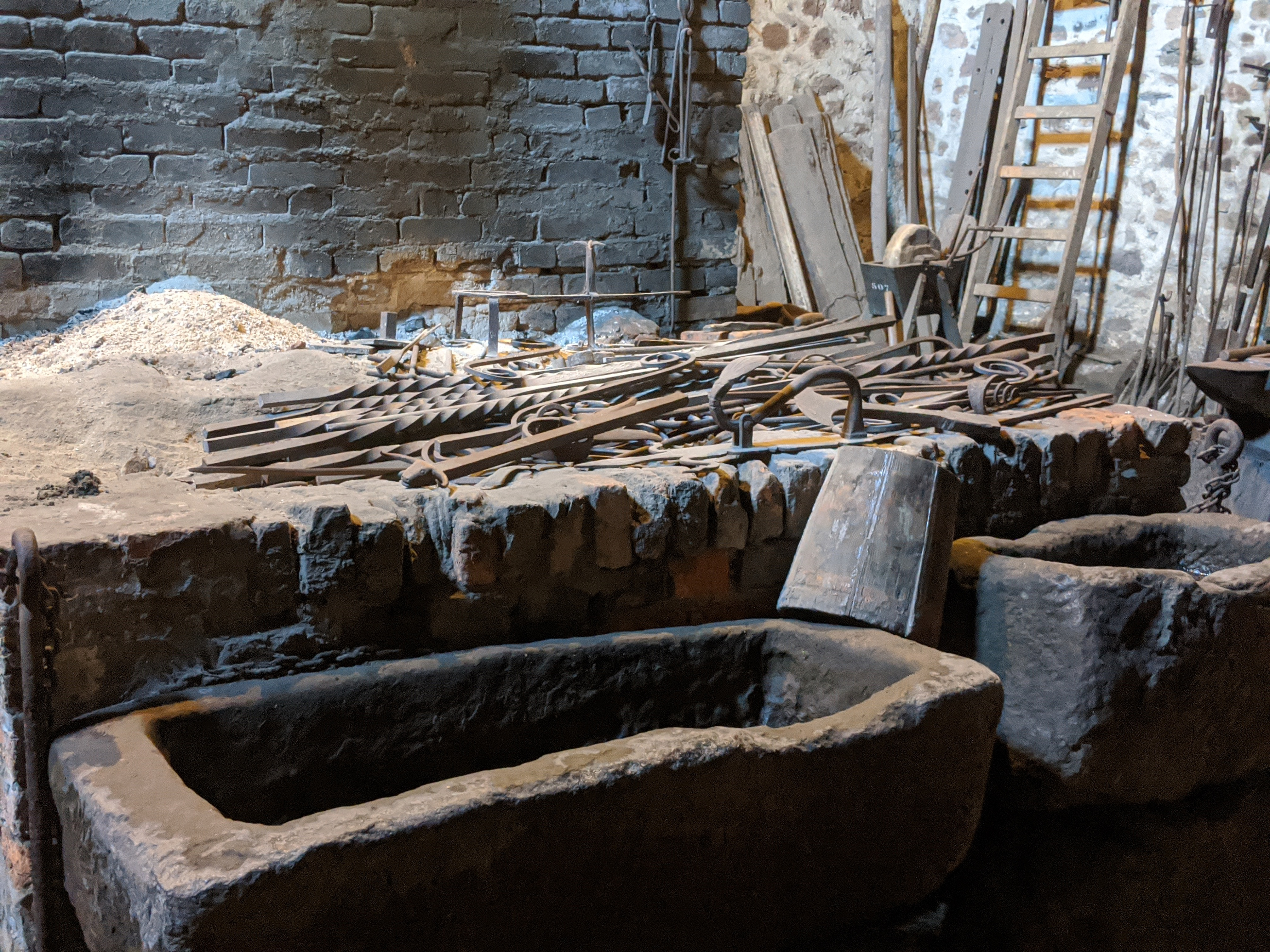 El Pobaleko burdinola Muskizko El Pobal auzoan dagoen burdinola da. Salazartarrek XVI. mendean eraiki zuten.